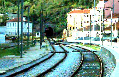 Entrada sul do túnel de Alcântara.